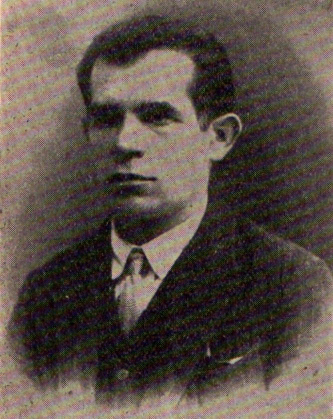 Srpskohrvatski / српскохрватски: Đuro Đaković